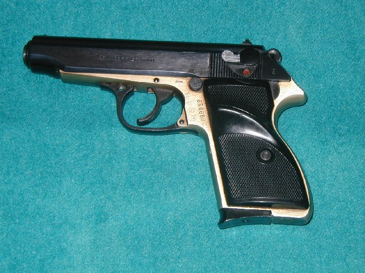 Węgierski pistolet samopowtarzalny FEG PA-63.